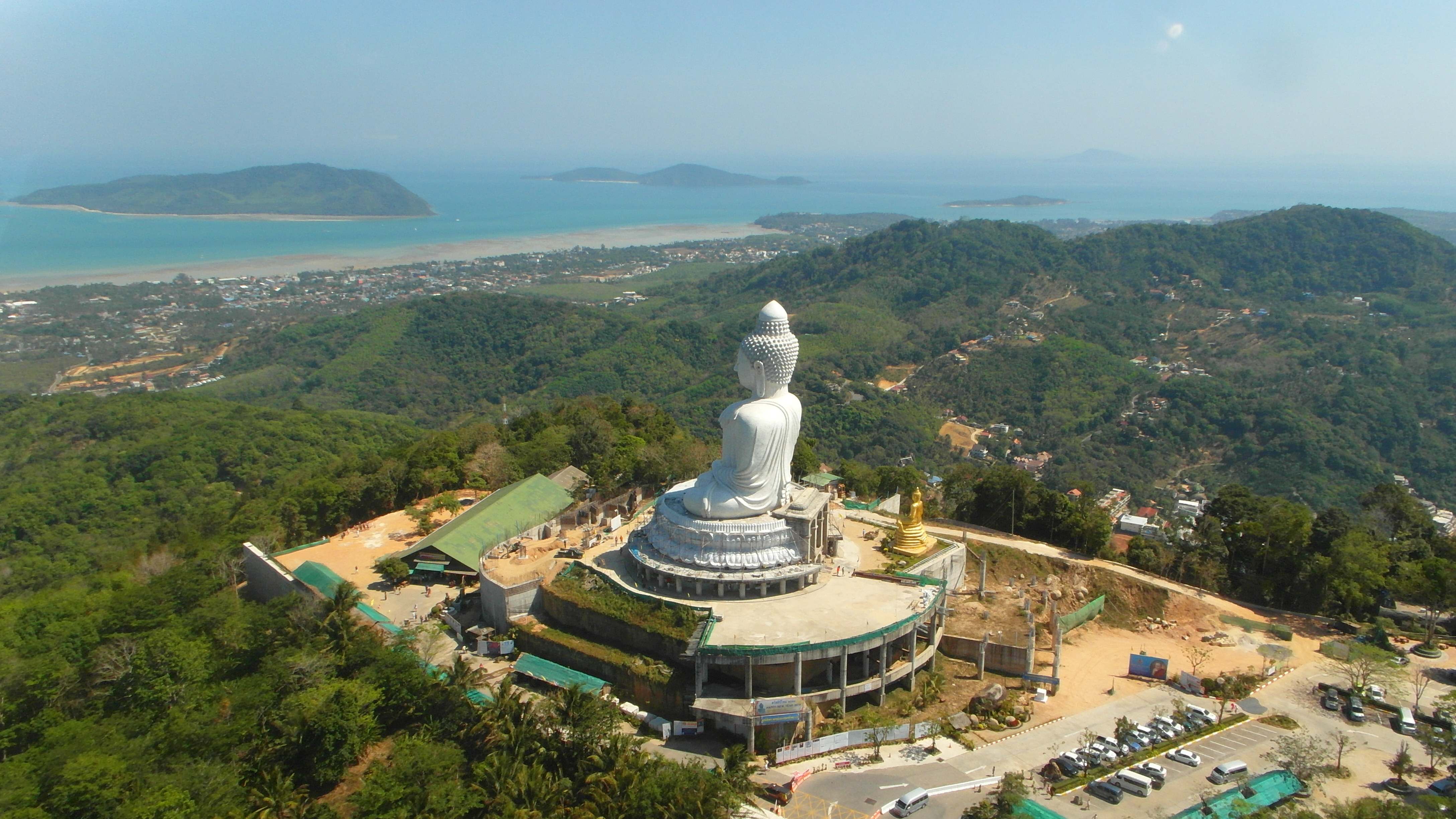 "Big Budda" Phuket 2014 february